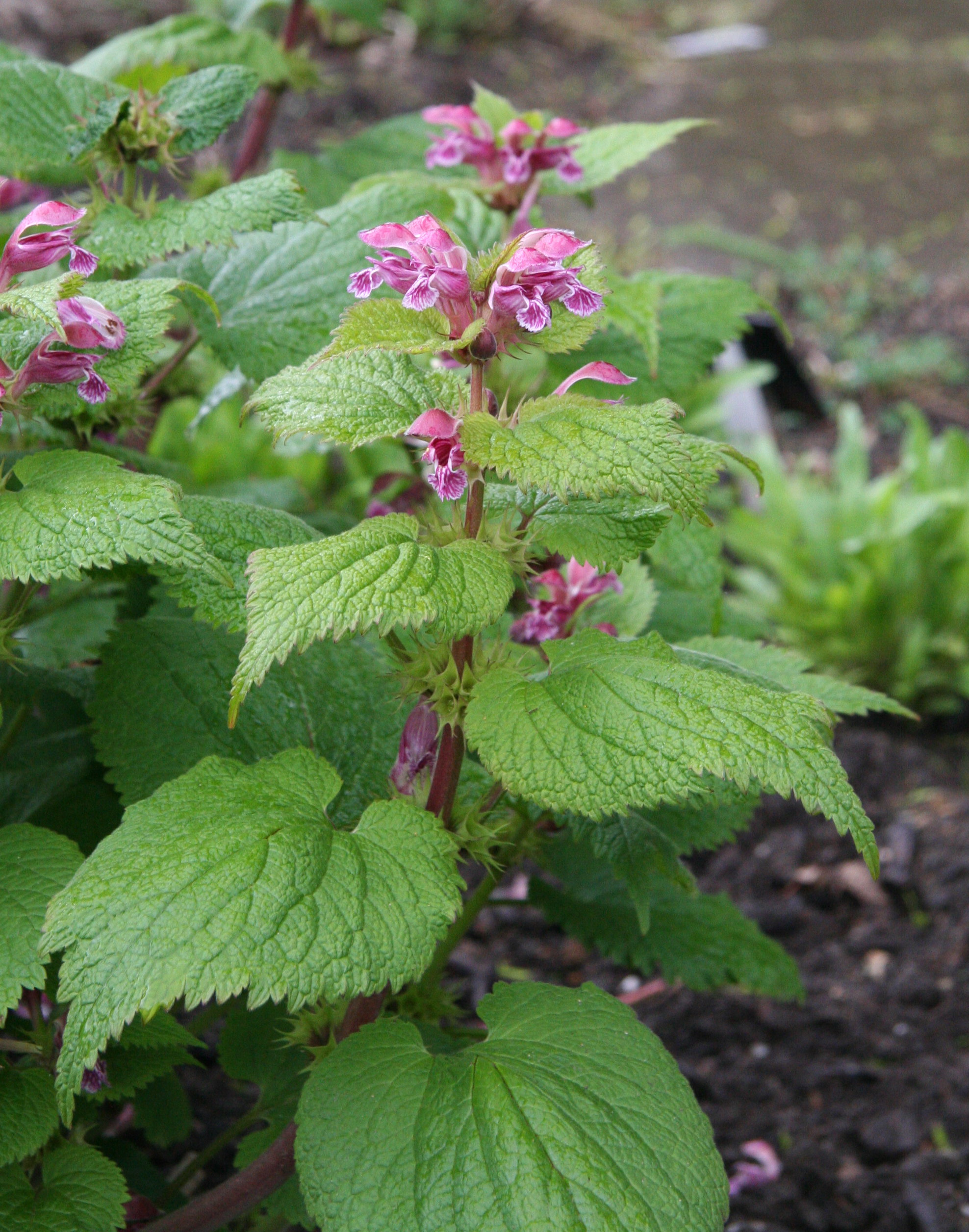 Lamium orvala im Botanischen Garten Köln